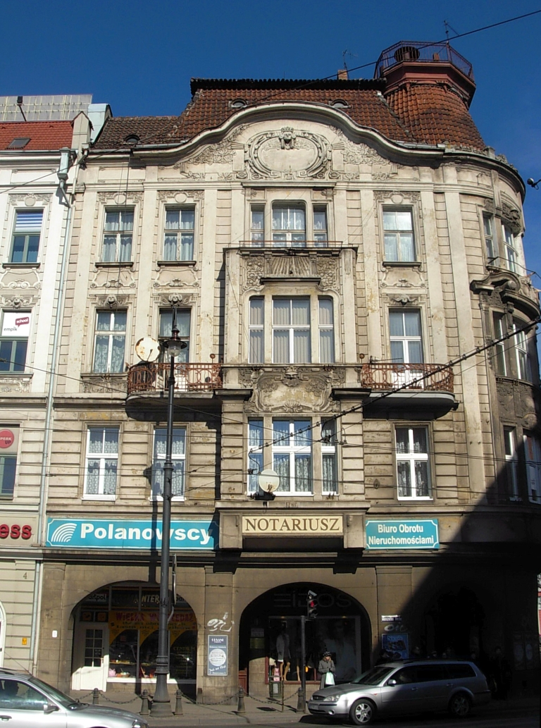 Kamienica ul. Ferdynanda Focha 2 w Bydgoszczy